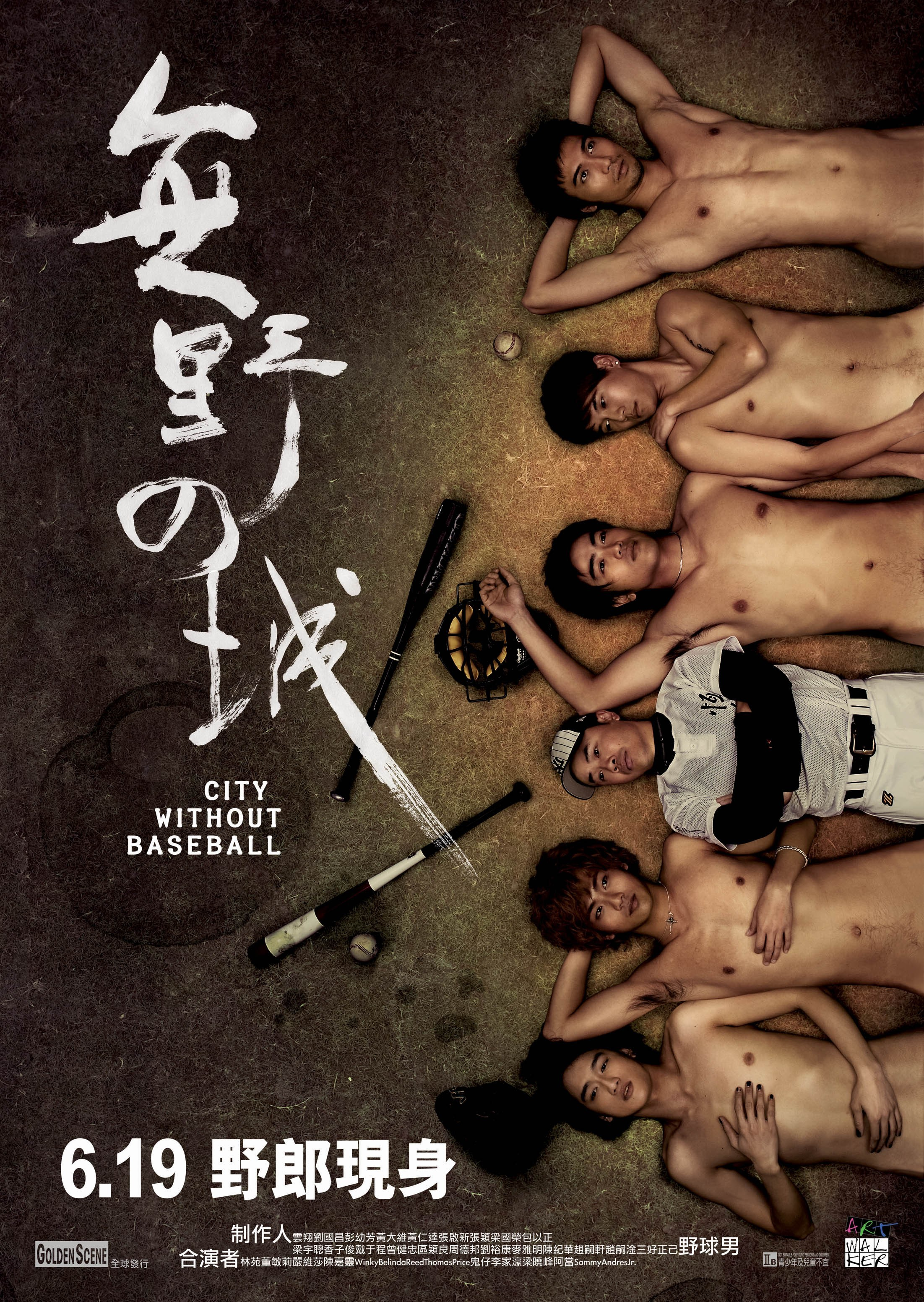 這是關於香港棒球隊的故事，取材自香港棒球隊員提供的事跡，並由他們演回自己。 棒球在香港是一項幾乎不存在的運動，一個嶄新的球場和一位具魅力的新教練，為一群精力充沛的小伙子帶來希望。這隊野球男在球場外的感情生活，穿插在激烈的球賽間，構成了他們與別不同的青春歲月。 從台北隻身而來的“大帥哥”戴教練，邂逅聰明而美麗的離島少女阿平，在得悉妹妹同樣愛上他後，阿平竟因愛妹情切而主動提議三人行。阿聰是港隊的首席投手, 和捕手阿忠是共同進退的拍檔兼好友。比阿聰年少的阿俊有意挑戰先發投手的位置，令阿忠非常不滿。胸襟廣闊的阿聰毫無保留地幫助阿俊練球，此舉不但令阿俊佩服，更吸引了他的女友移情別戀。連番失戀的阿俊對阿聰的好感郤越來越強烈… 兩年一度的“亞洲盃”棒球大賽，從未有過好成績的港隊狀態大勇，連敗強敵，只要在最後一場輕取最弱的斯里闌卡，就可以奪得冠軍，創造歷史。當勝利在望之時…